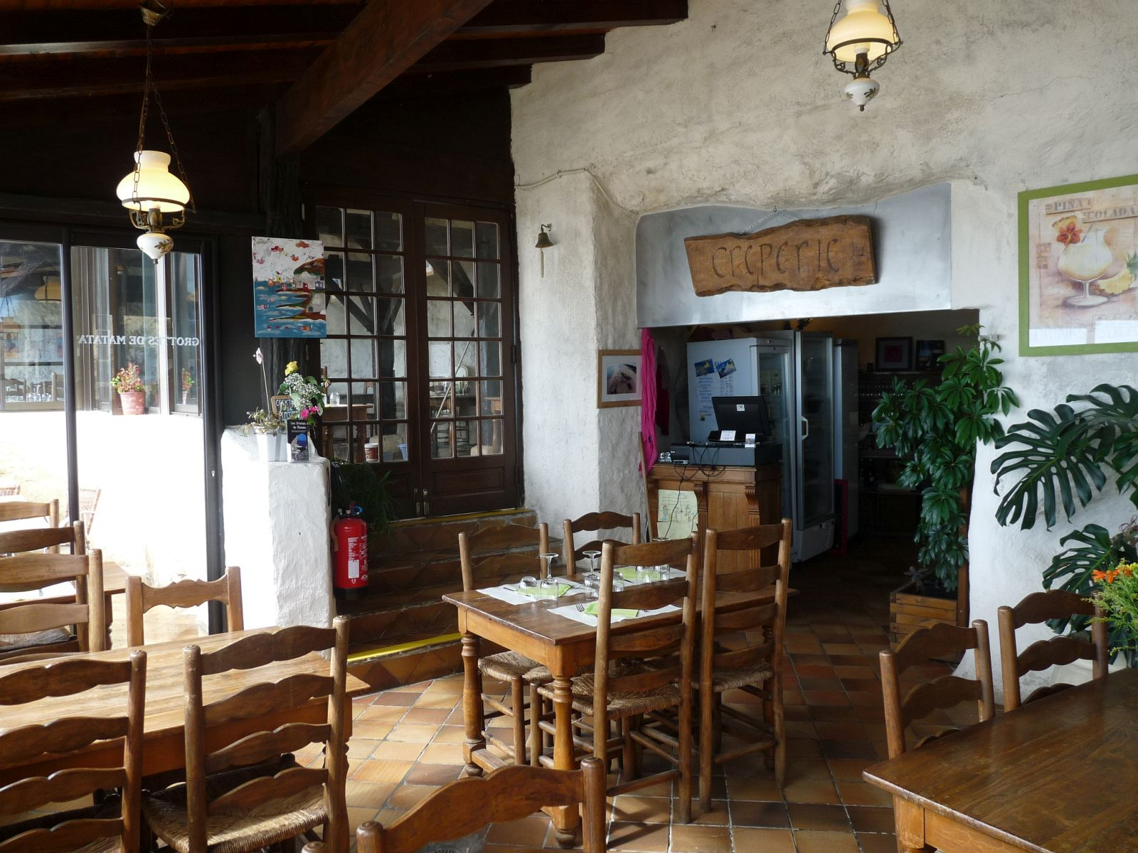 Salle de restaurant, grottes de Matata, Meschers, Charente-Maritime, France